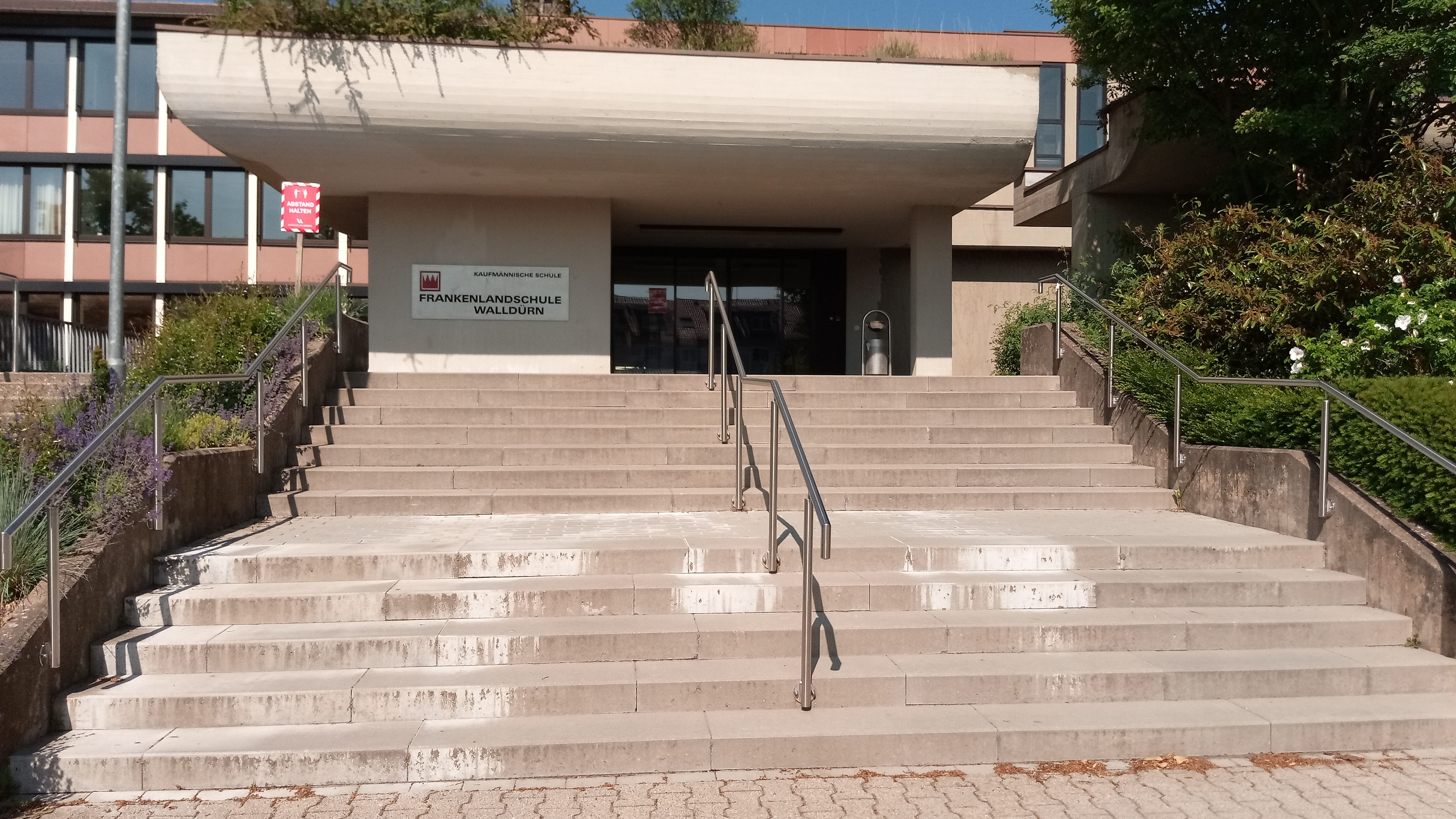 Eingangsportal der Frankenlandschule Walldürn, die Aufnahme entstand während der Coronakrise, links im Bild ein Plakat mit der Aufforderung Abstand zueinander zu halten